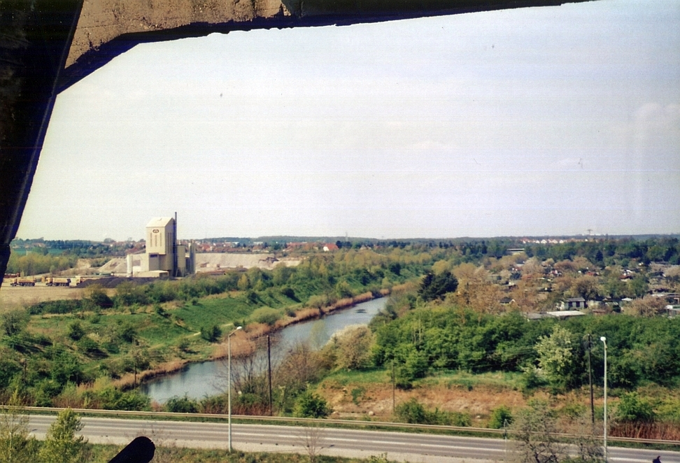 Blick von der Hafen-Umschlag-Speicherei am Lindenauer Hafen in Leipzig nach Nordwesten entlang des Elster-Saale-Kanals